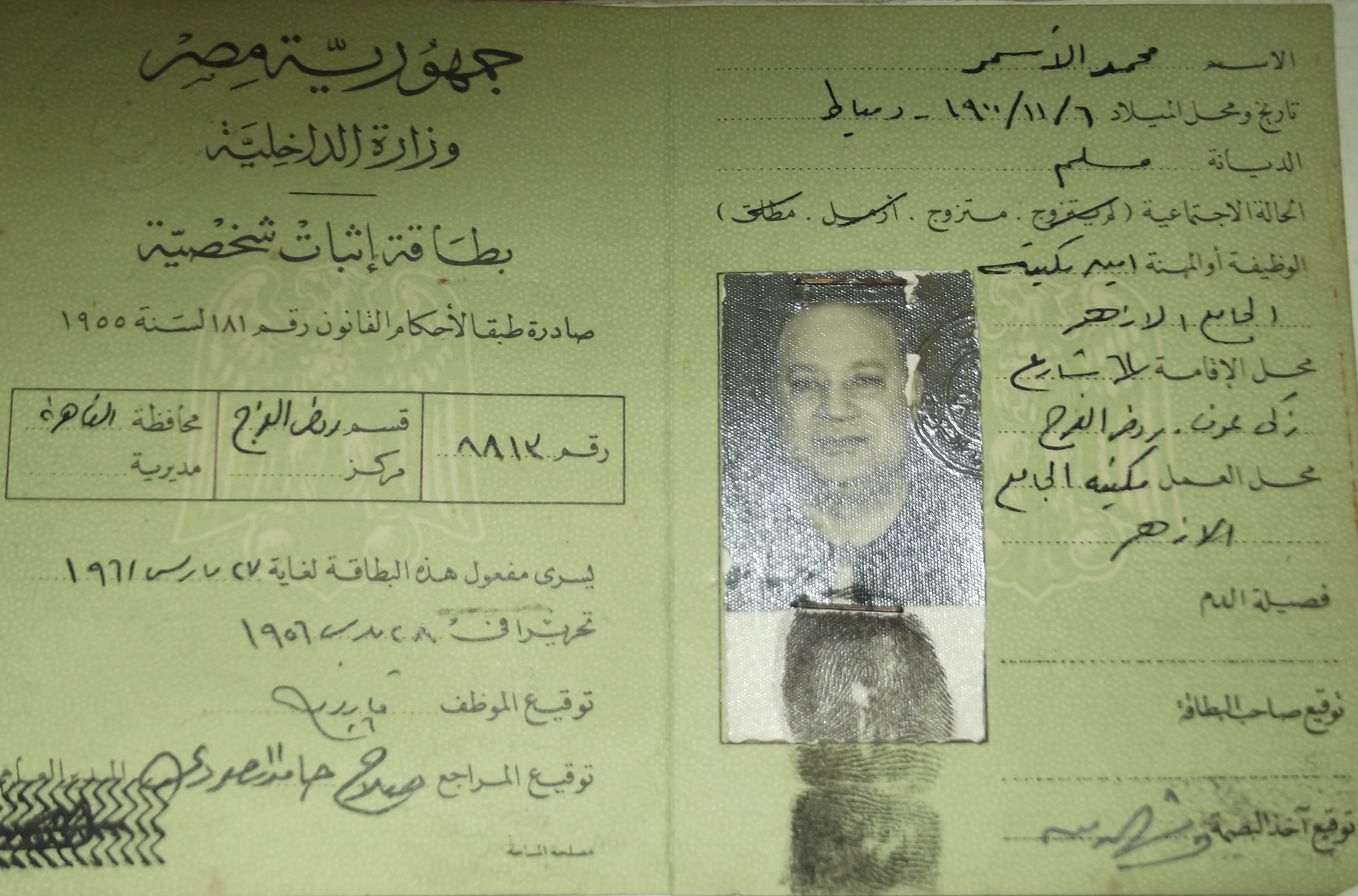 صورة ضوئية للبطاقة الشخصية الخاصة بالشاعر المصري الراحل محمد الأسمر